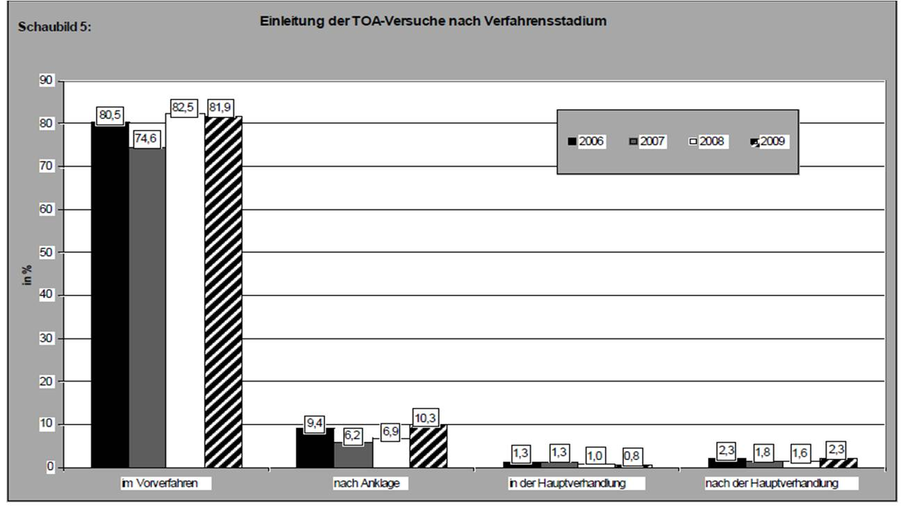 Die Statistik beschreibt für die Jahre 2006-2009 in welchem Stadium des Gerichtsverfahrens ein Täter-Opfer-Ausgleich initiiert wurde